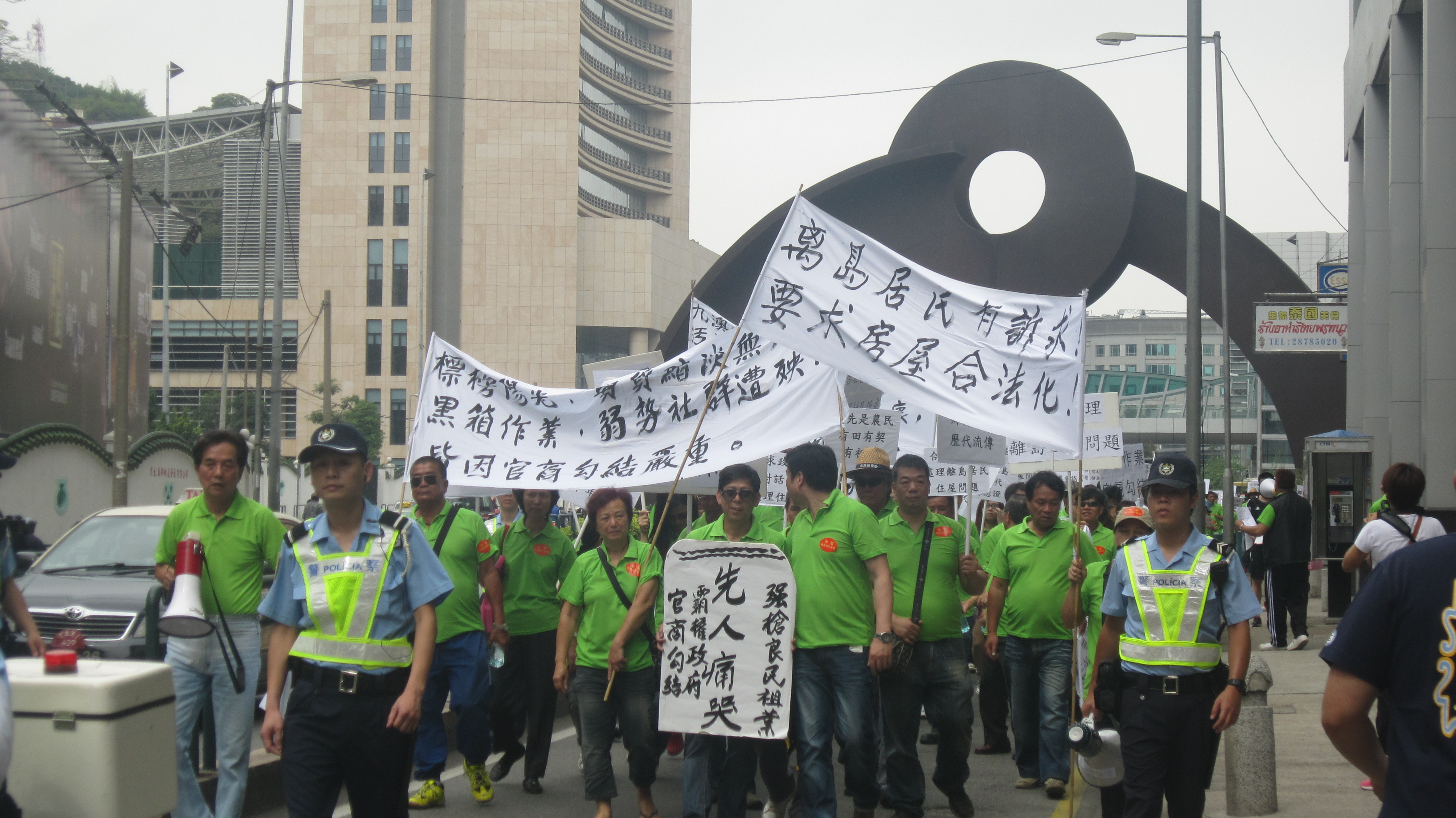 Procissão em 1 de Maio de 2011 em Macau